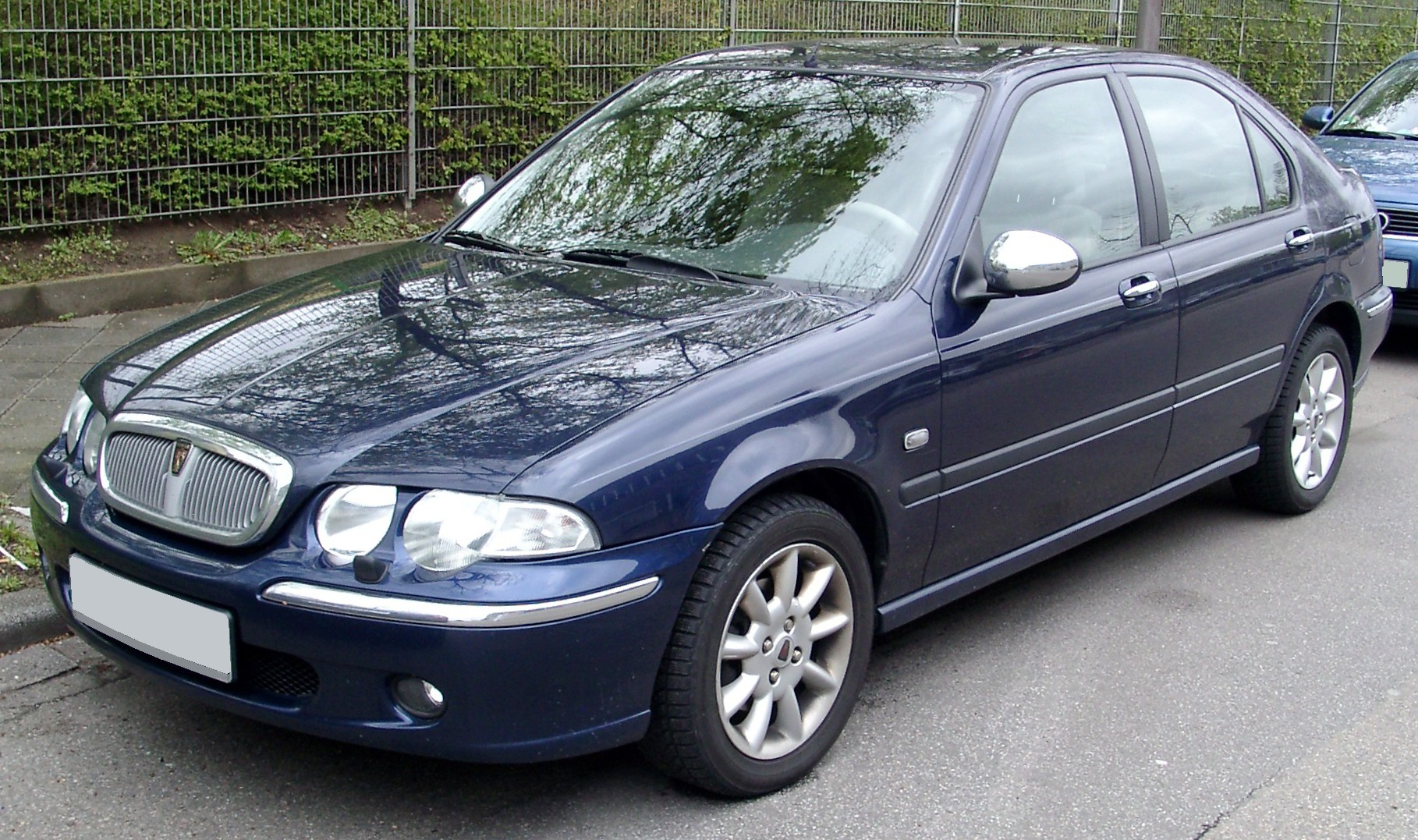 Rover 45